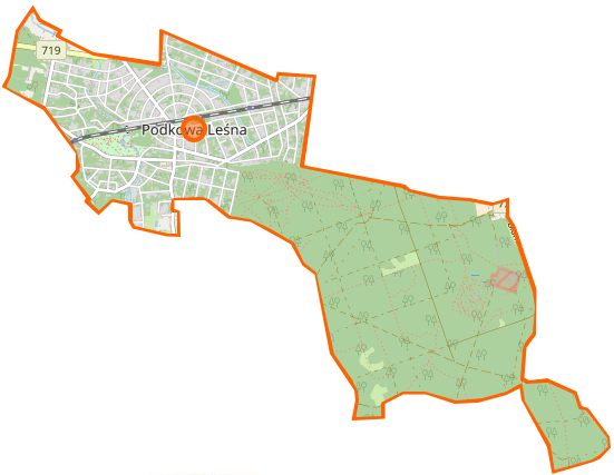 Mapa Podkowy Leśnej (stan na 2018)